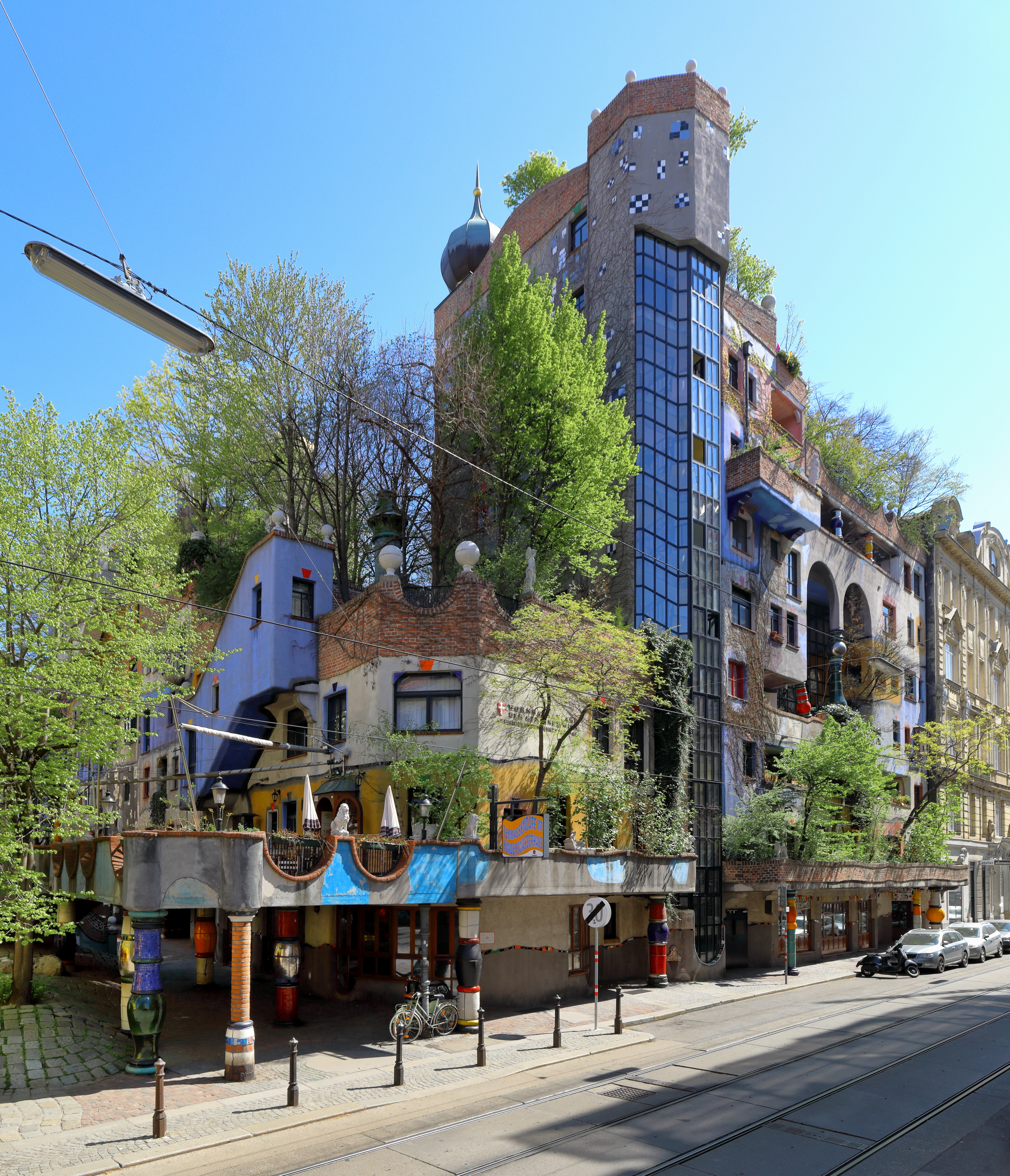 Ecke Kegelgasse/Löwengasse des Hundertwasserhauses im 3. Wiener Gemeindebezirk Landstraße.Die Wohnhausanlage der Gemeinde Wien mit 50 Wohneinheiten wurde als Ökohaus von 1983 bis 1985 errichtet. Entworfen wurde sie von dem Künstler Friedensreich Hundertwasser, anfangs in Zusammenarbeit mit dem Architekten Josef Krawina. Nach dem Zerwürfnis Hundertwasser mit dem Architekten Krawina, wurde die Wohnhausanlage mit dem Architekten Peter Pelikan fertiggestellt.